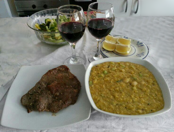 Porotos Granados con Mazamorra de Maiz (choclo). Preparación chilena